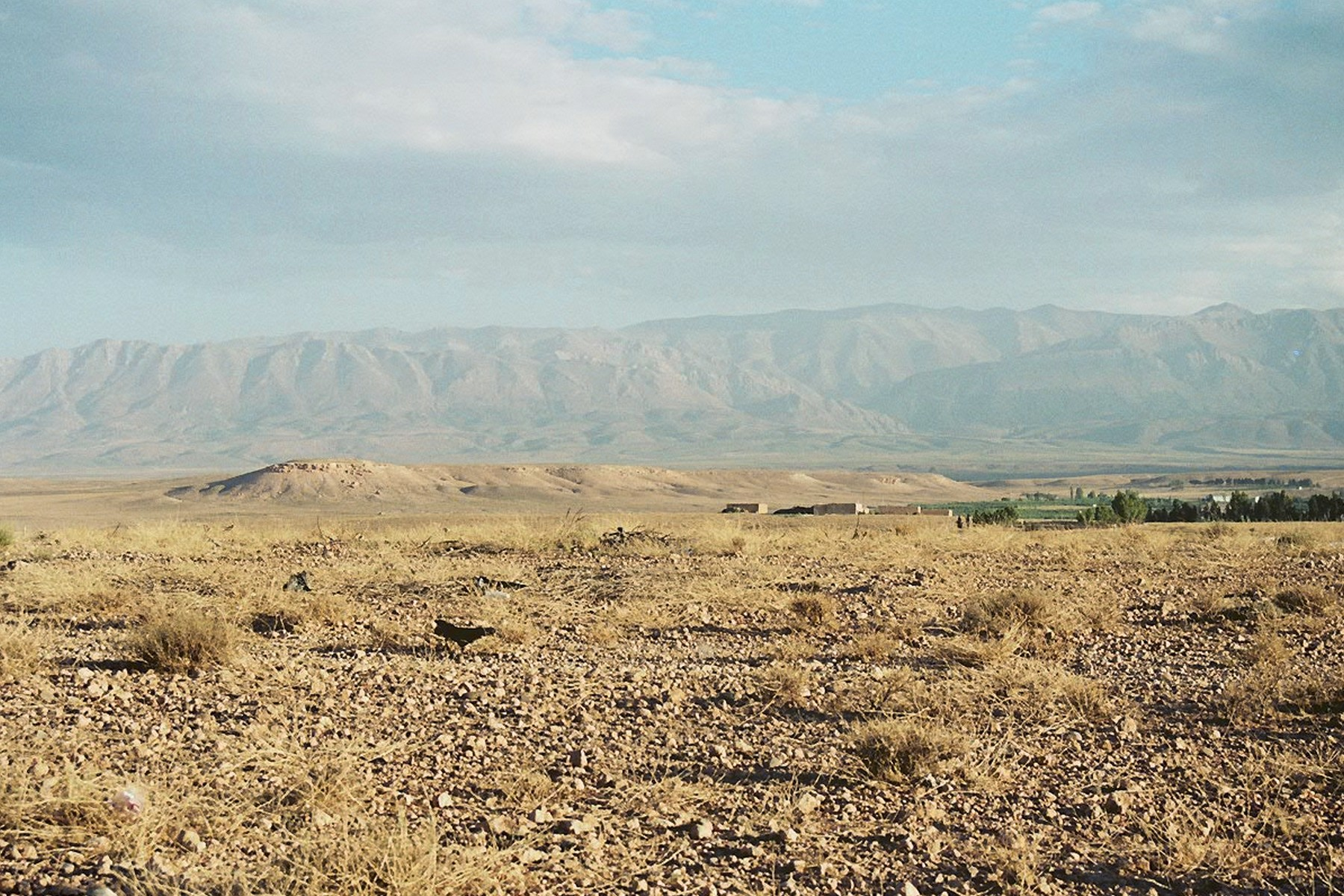 vlastní dílo